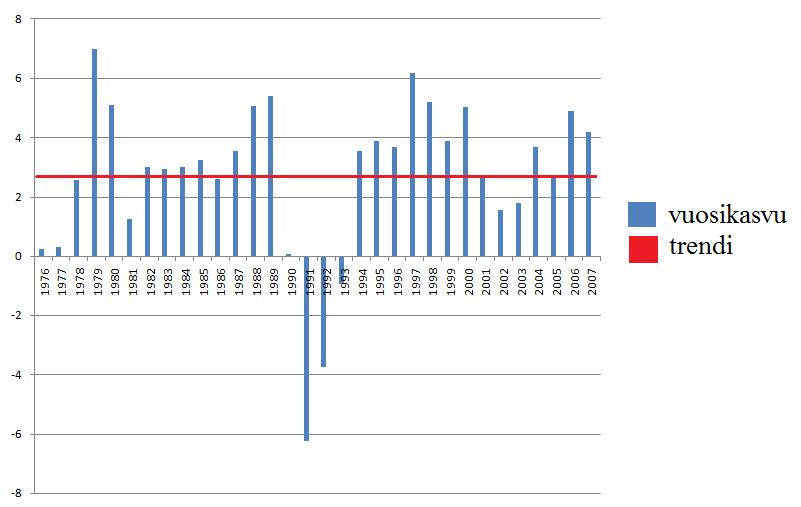 Suomen reaalinen kokonaistalouskasvu 1975-2007 ja trendi